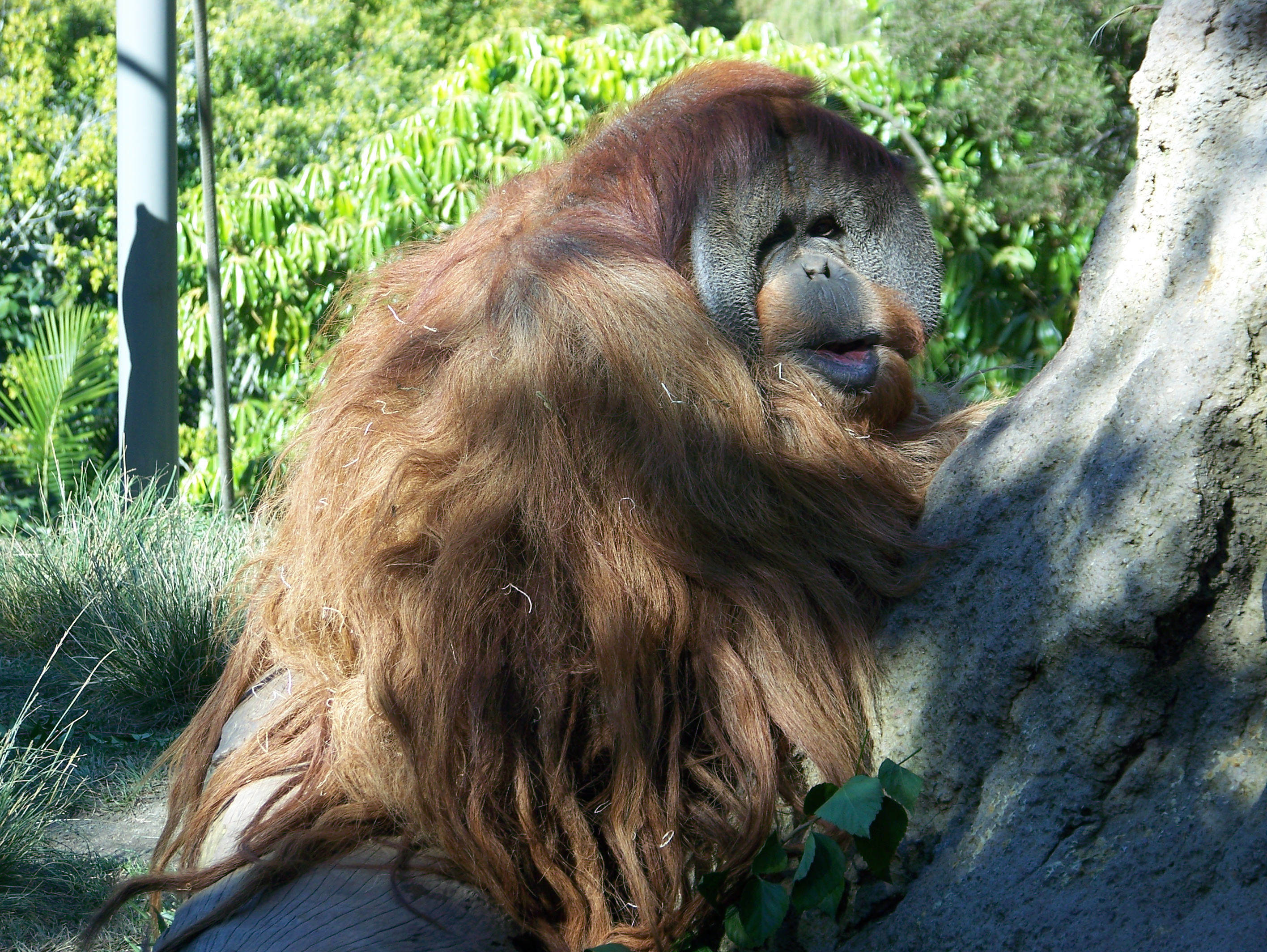 An orangutan at the San Diego Zoo